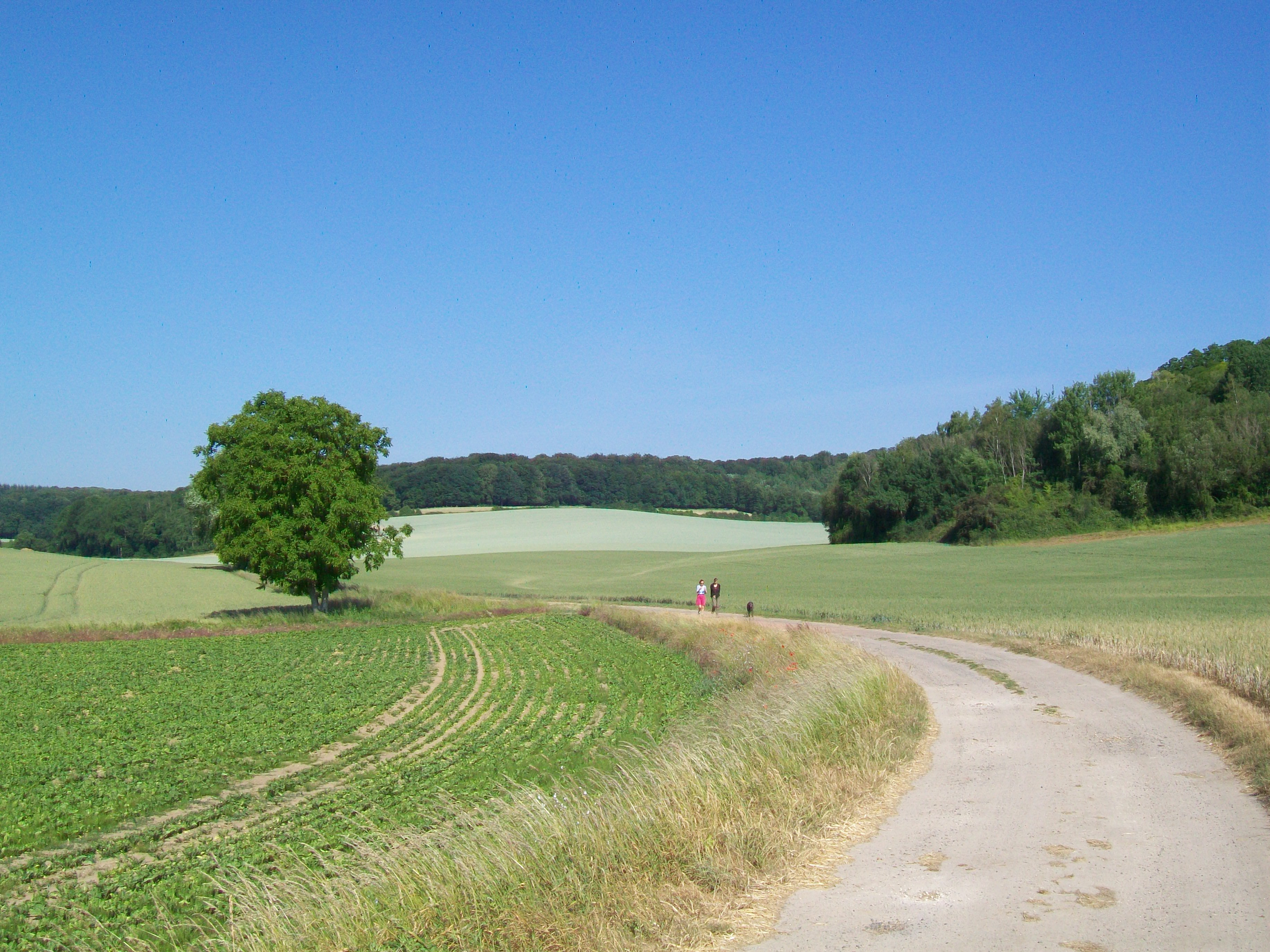 Chemin rural à l'ouest d'Yvillers, en direction de la forêt d'Halatte (route d'Yvillers - poteau d'Yvillers).